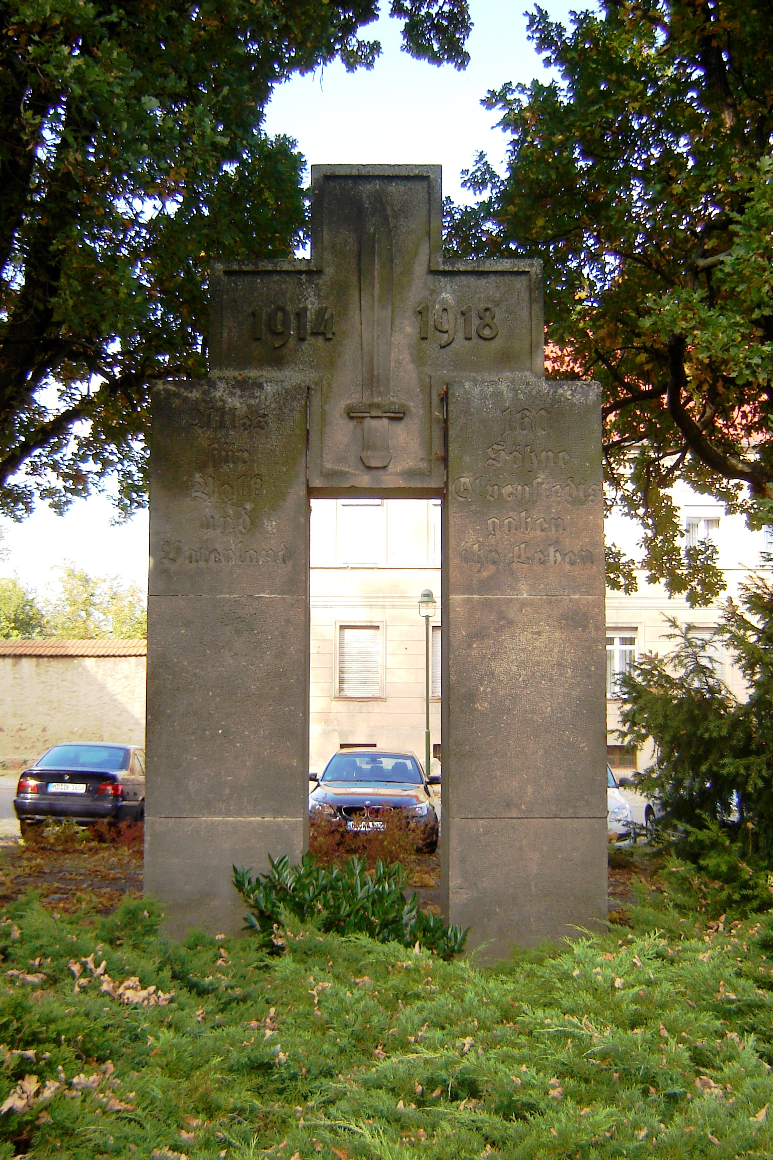 Magdeburg-Alt Olvenstedt, Kriegerdenkmal (Kulturdenkmal)